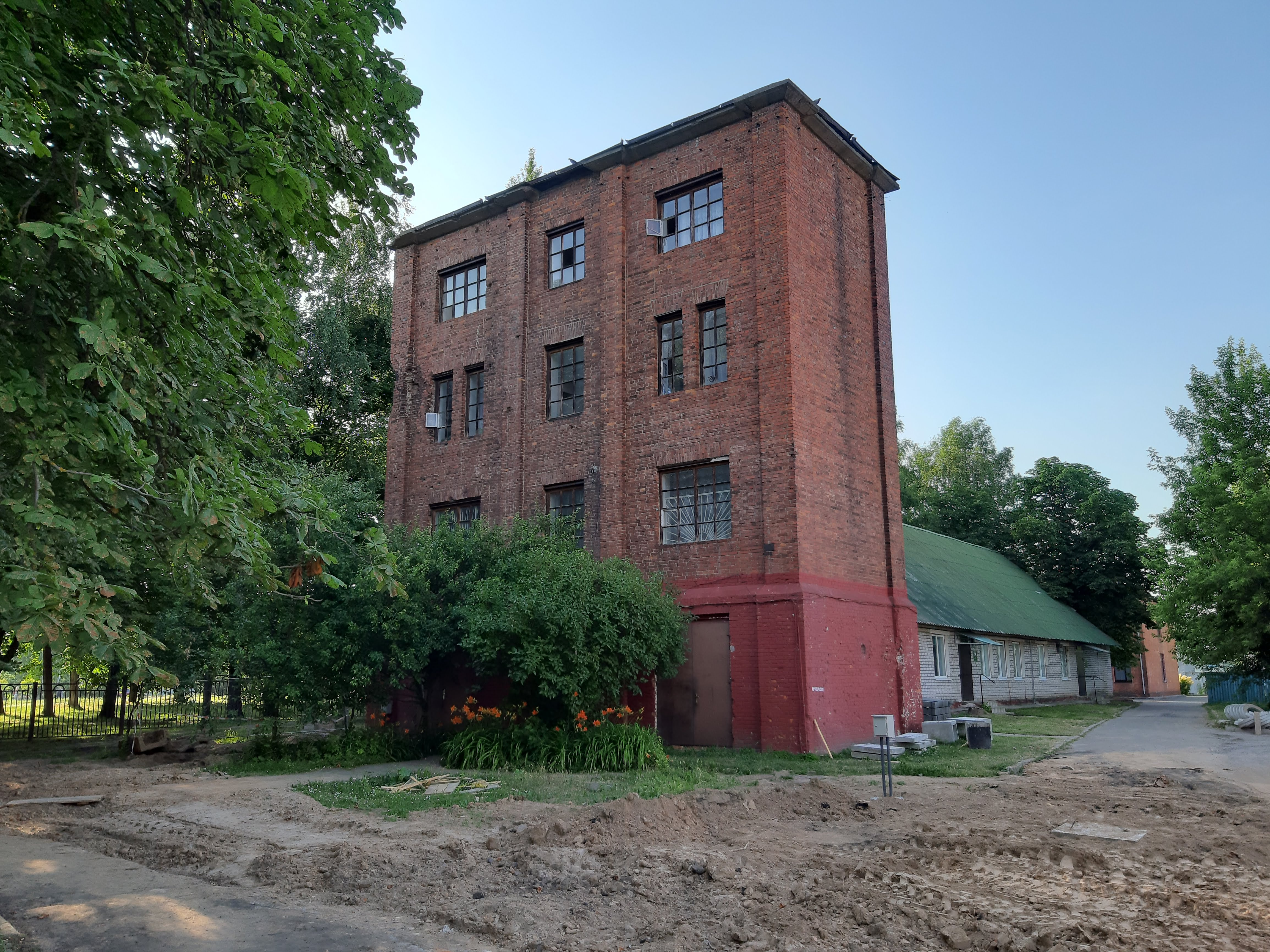 Магілёў. Вуліца Сурганава